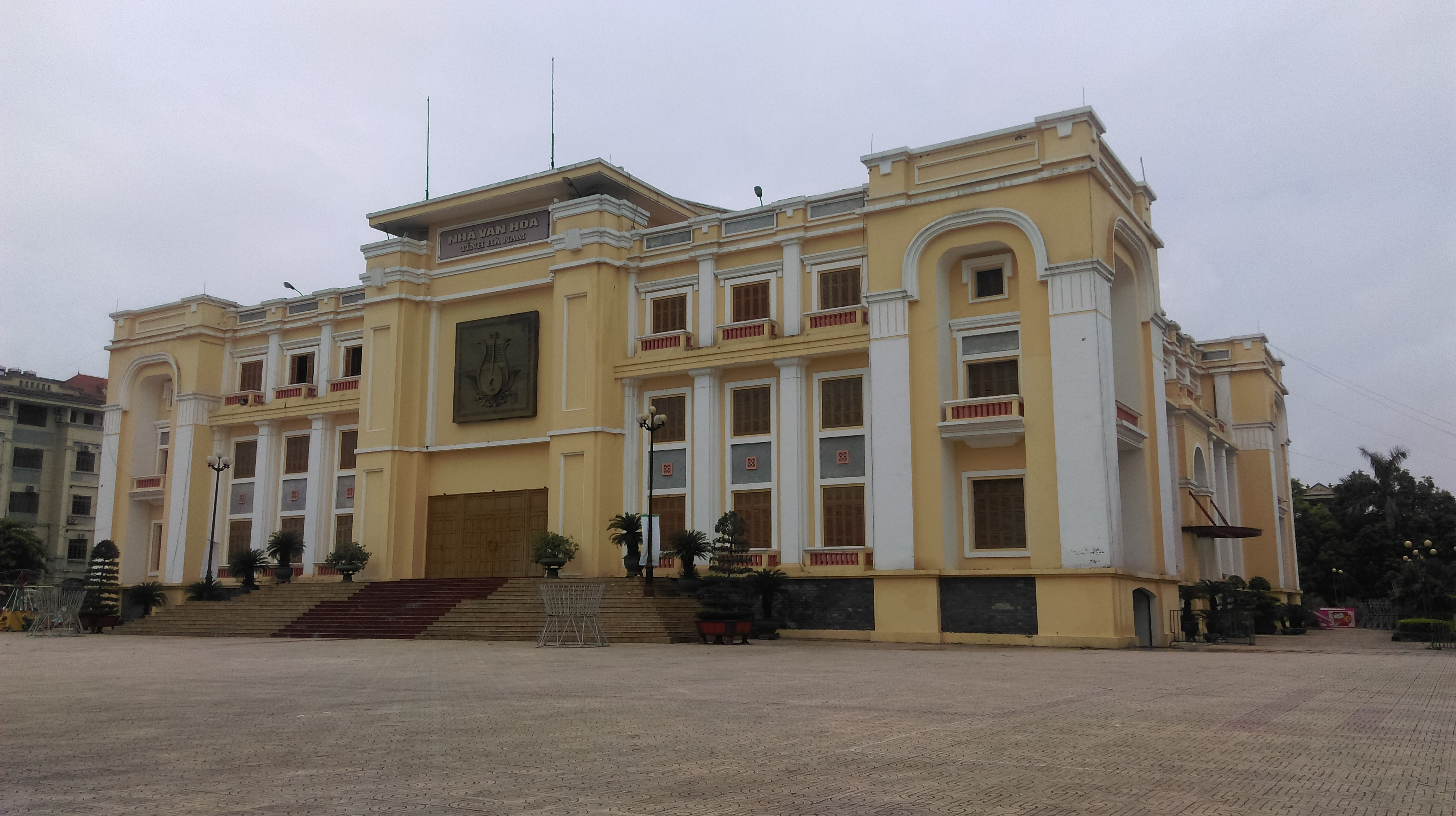 Nhà Văn hóa tỉnh Hà Nam